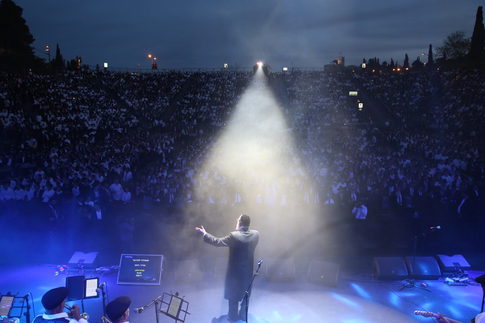 שלמה כהן בבריכת הסולטן